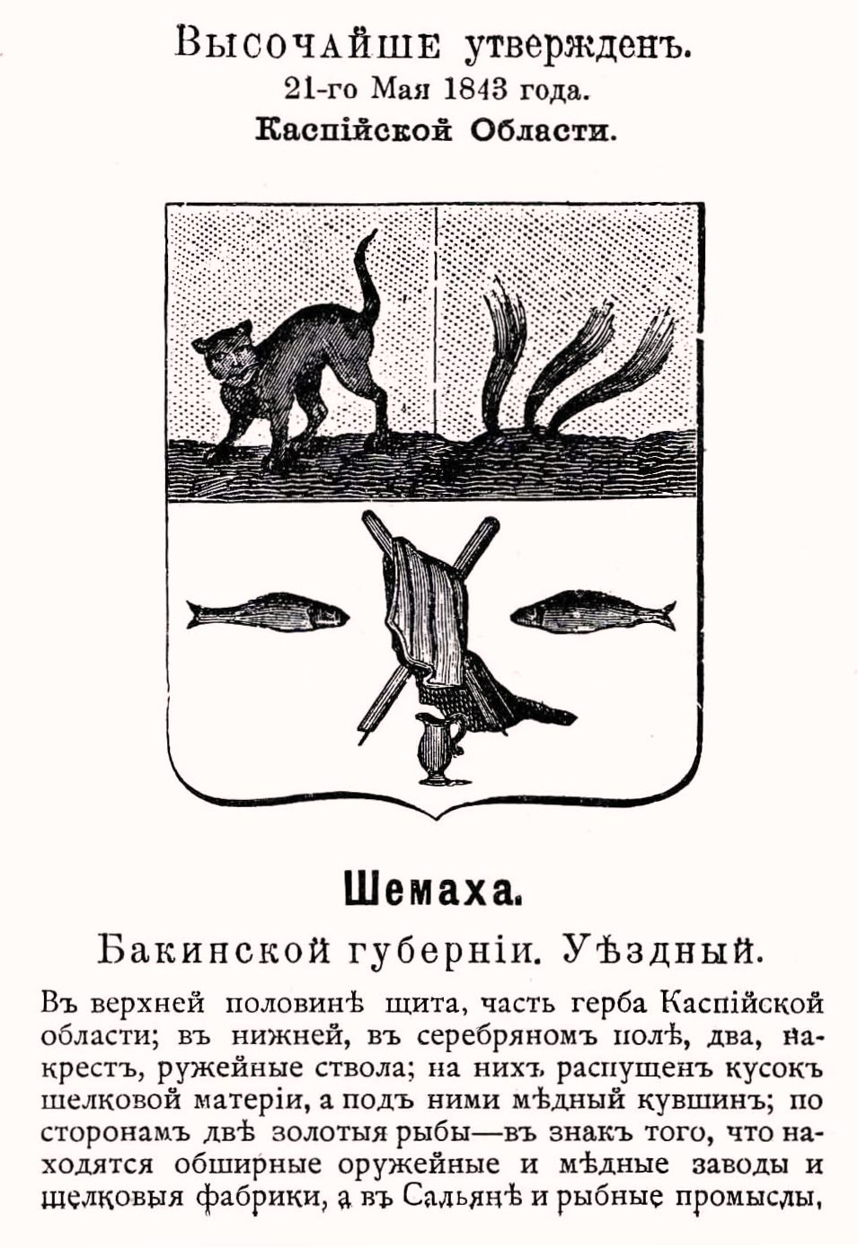 Official Russian Empire coat of arms Shemaha. Герб Российской Империи уездного города Шемаха Бакинской губернии (в 1843 - административного центра Каспийской области) с официальным описанием в Гербовнике Винклера.